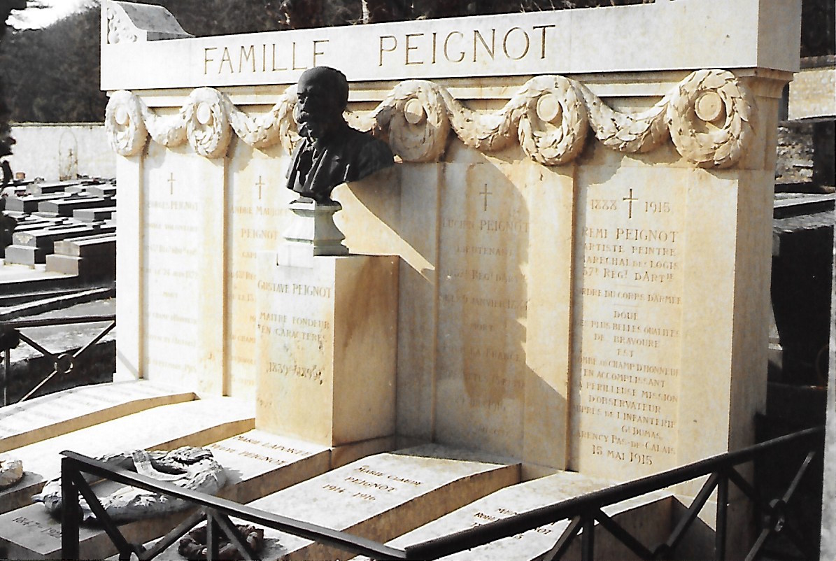 Tombe des quatre frères Peignot au cimetière de Fontainebleau